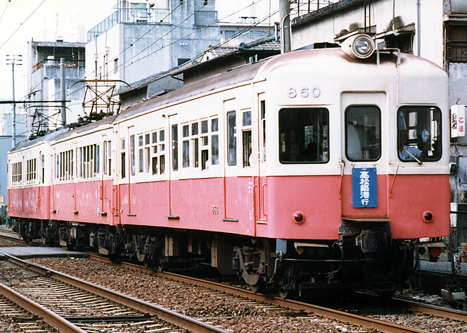 高松琴平電鉄 860形860